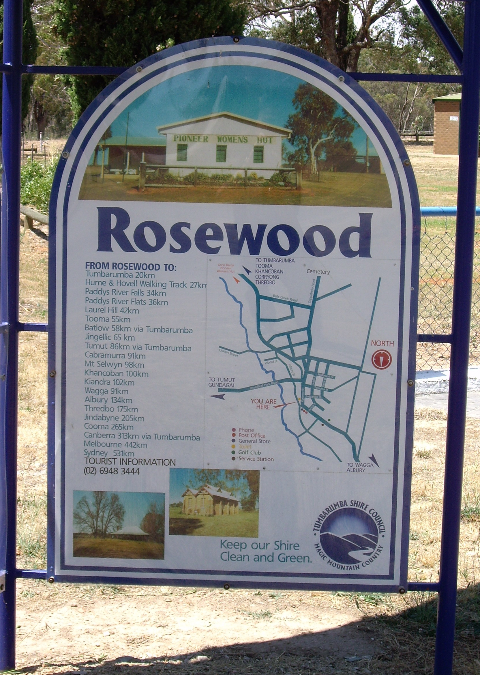 Entering Rosewood